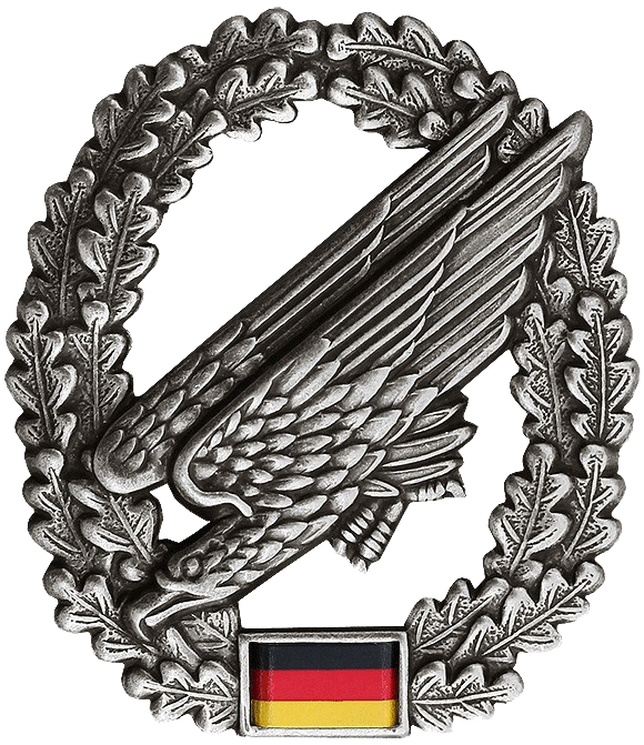 Barettabzeichen der Fallschirmjägertruppe der Bundeswehr auch Division Schnelle Kräfte Barettfarbe: Bordeauxrot Maße: Hoch: 53mm Breit: 46mm Ausführung: altsilber, Metall